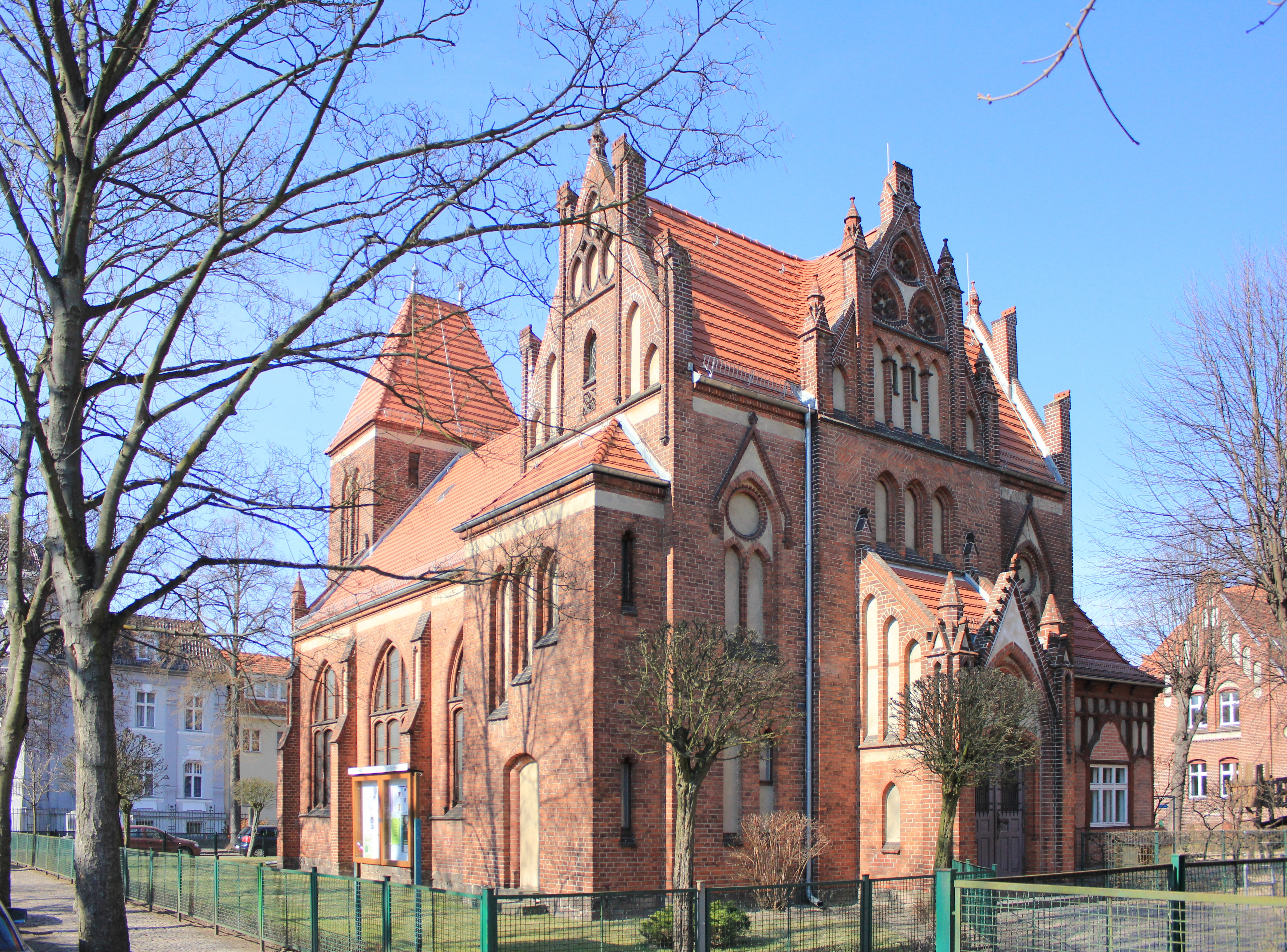 Lutherkirche mit Pfarrhaus 1905-07 von Fritz Gottlob